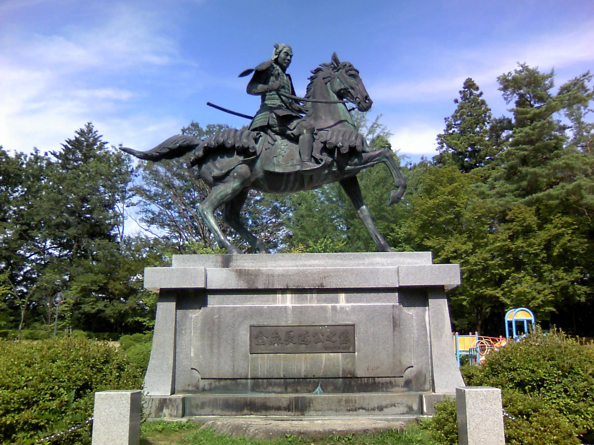 金森長近像（岐阜県高山市城山公園）